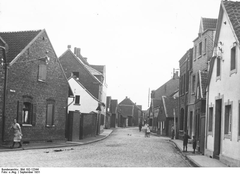 Ein ganzes Dorf gepfändet ! Die kleine Ortschaft Holzheim bei Neuss a/Rh. wurde durch den Gerichtsvollzieher vollständig gepfändet. 250 Familien mit insgesamt 2850 Köpfen sollen für leichtfertige Kreditgeschäfte ihres Ortes aufkommen. Der Versteigerungstermin ist auf den 12. Oktober angesetzt. Blick in eine Strasse des gepfändeten Dorfes Holzheim b/Neuss a/Rh.